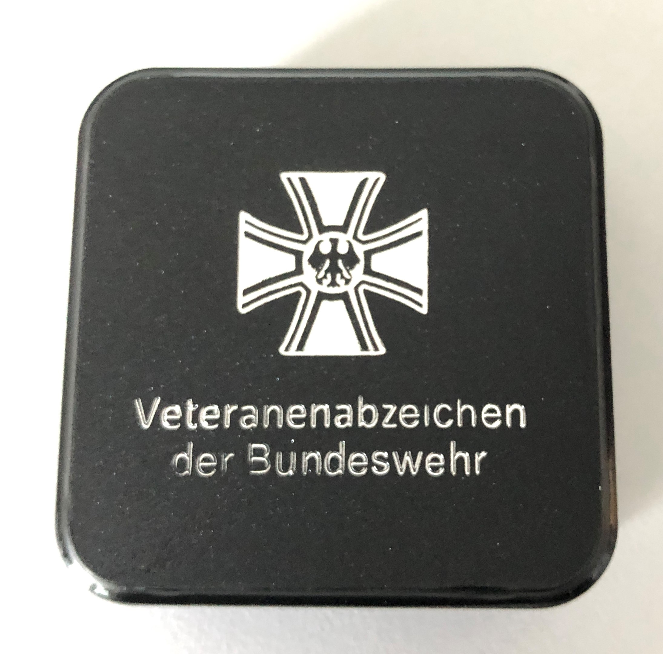 Schachtel zum Veteranenabzeichen der Bundeswehr